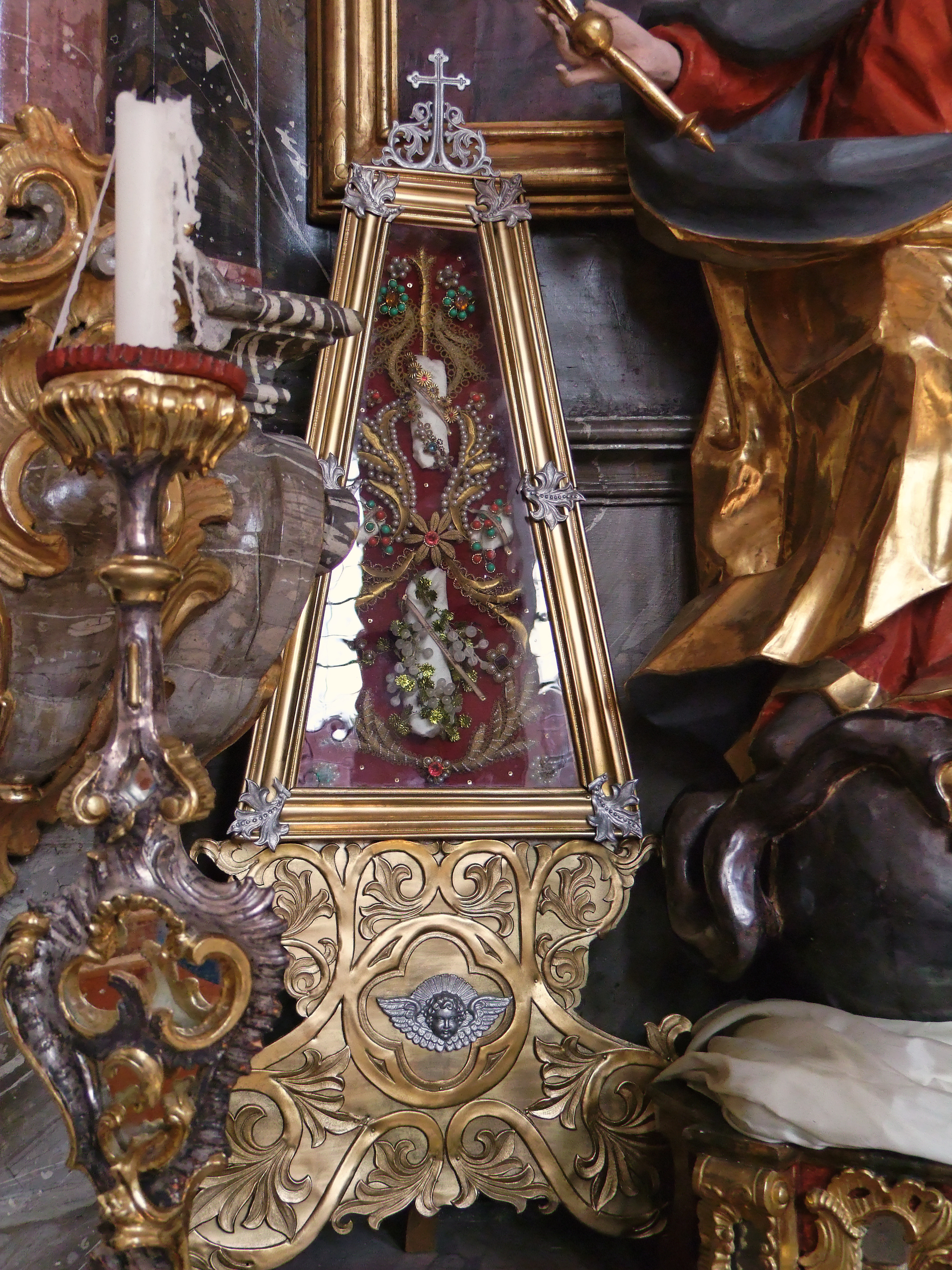 St. Magnus in Unterrammingen in Oberschwaben